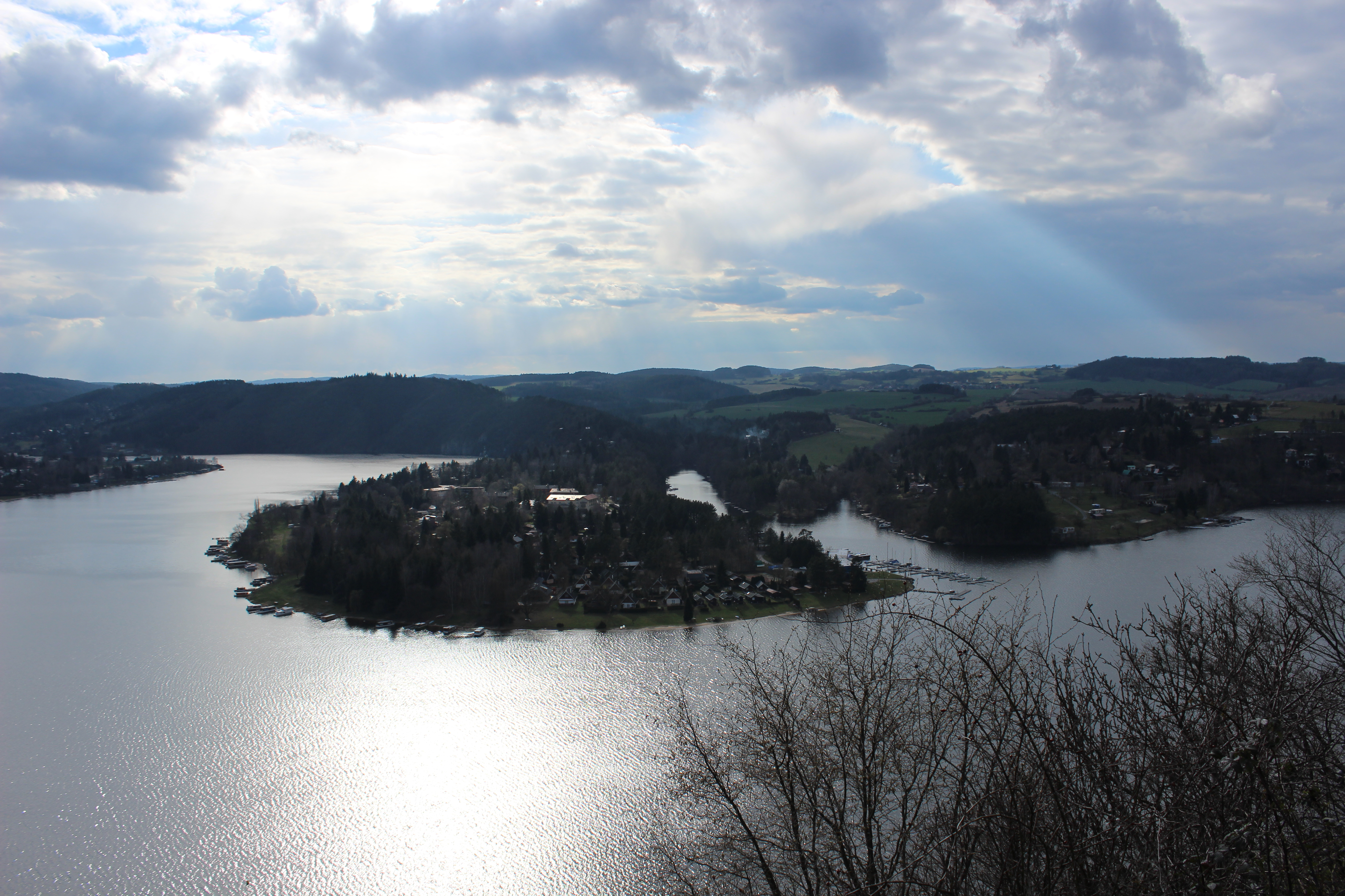 Vodní nádrž Slapy je přehradní nádrž na řece Vltavě. Česká republika.